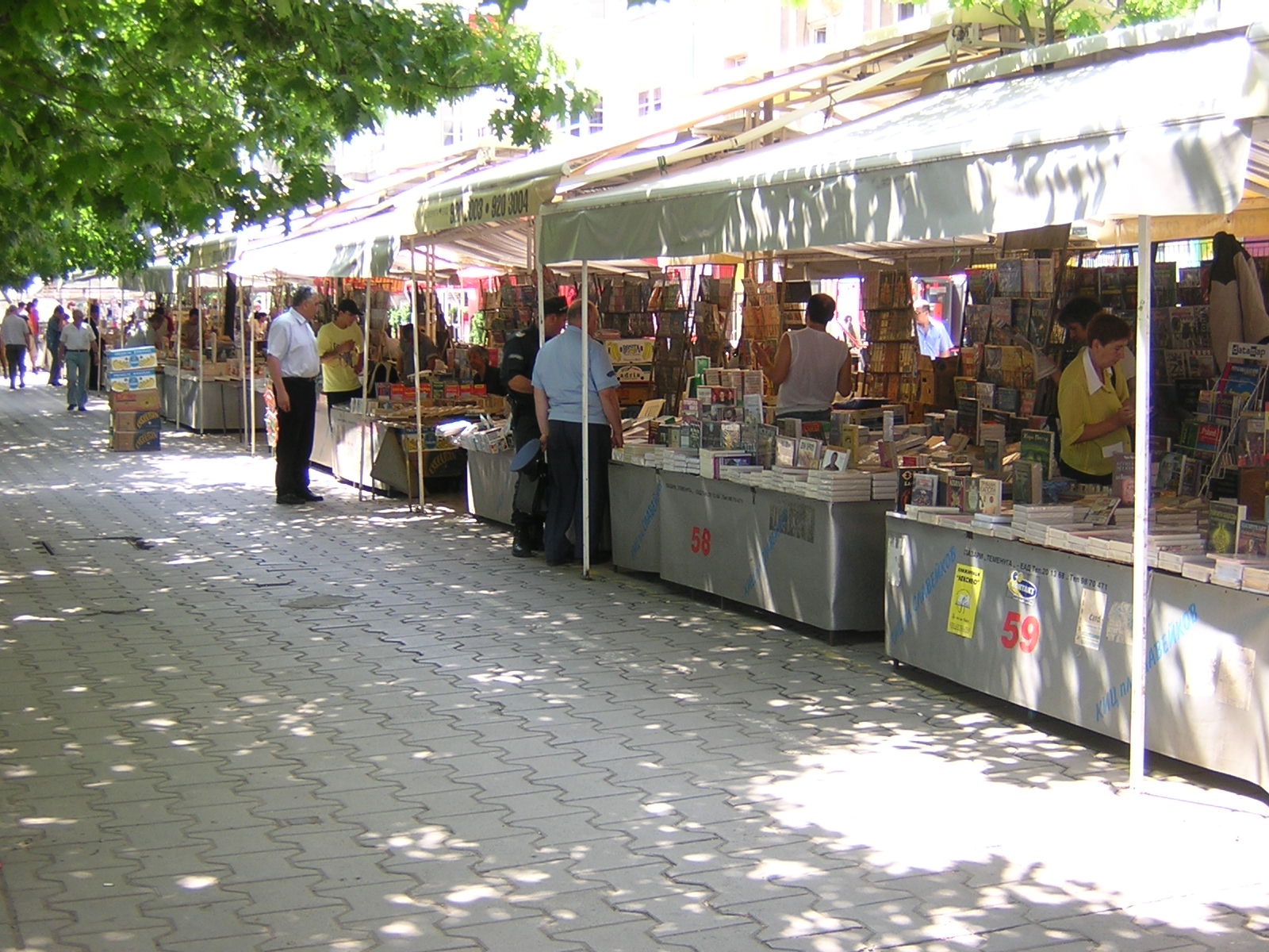 Bookstalls on Slaveykov Square, Sofia, Bulgaria.